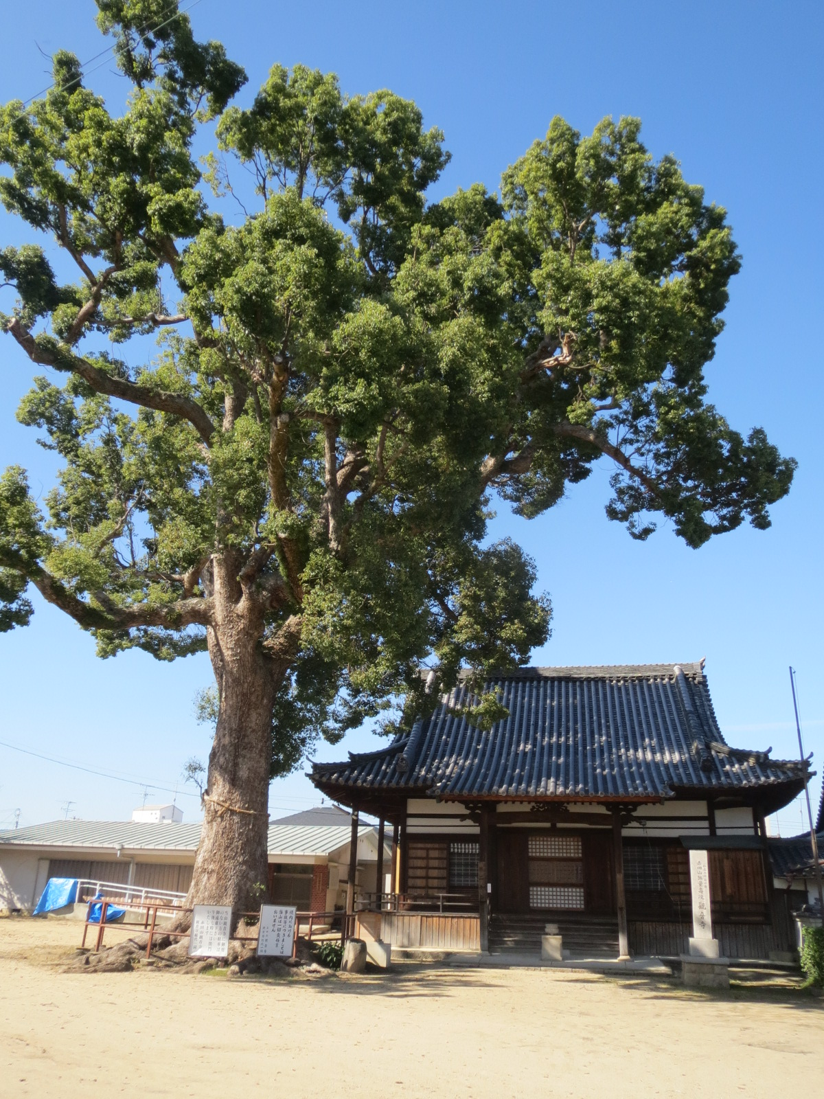 和泉市にある観音寺